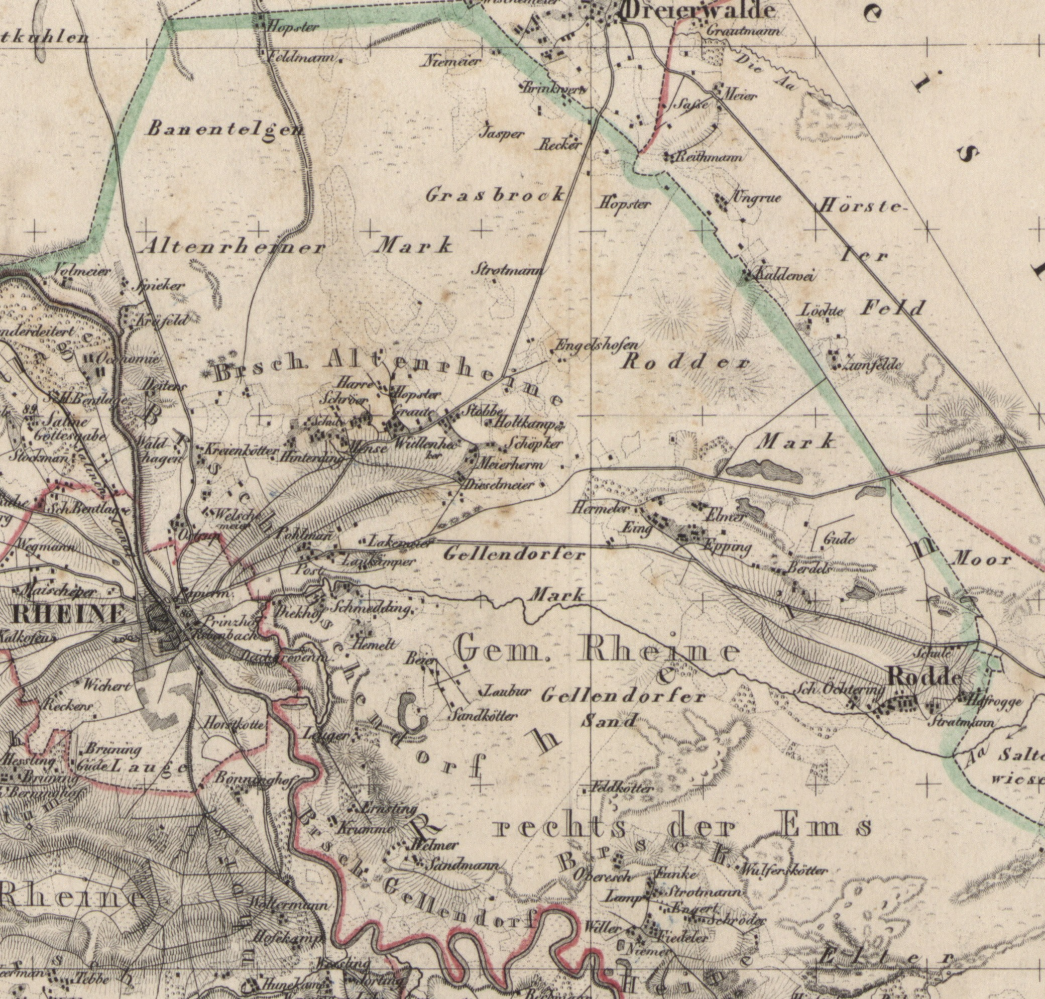 Location of Rheine rechts der Ems